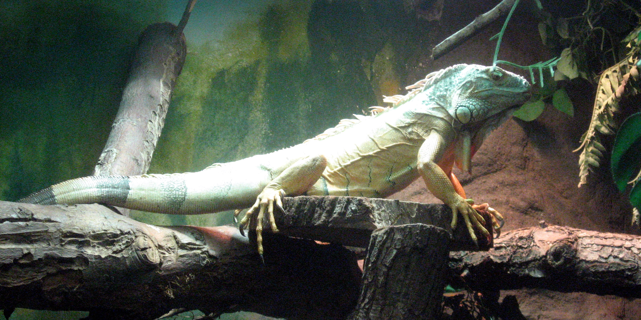 Leguán zelený